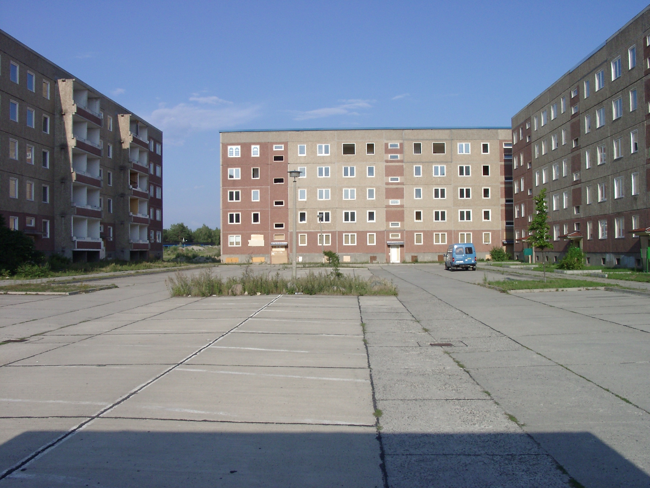 Leerstand von Plattenbauwohngebieten im sächsischen Weißwasser